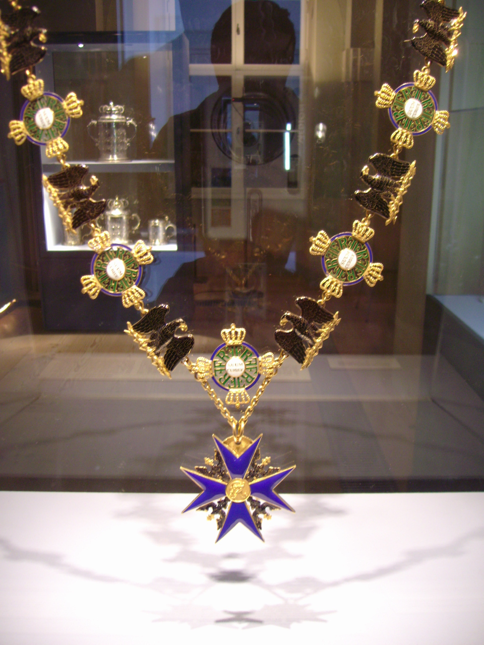 Ordenskette des Schwarzen Adlerordens im Museum Oranienburg.